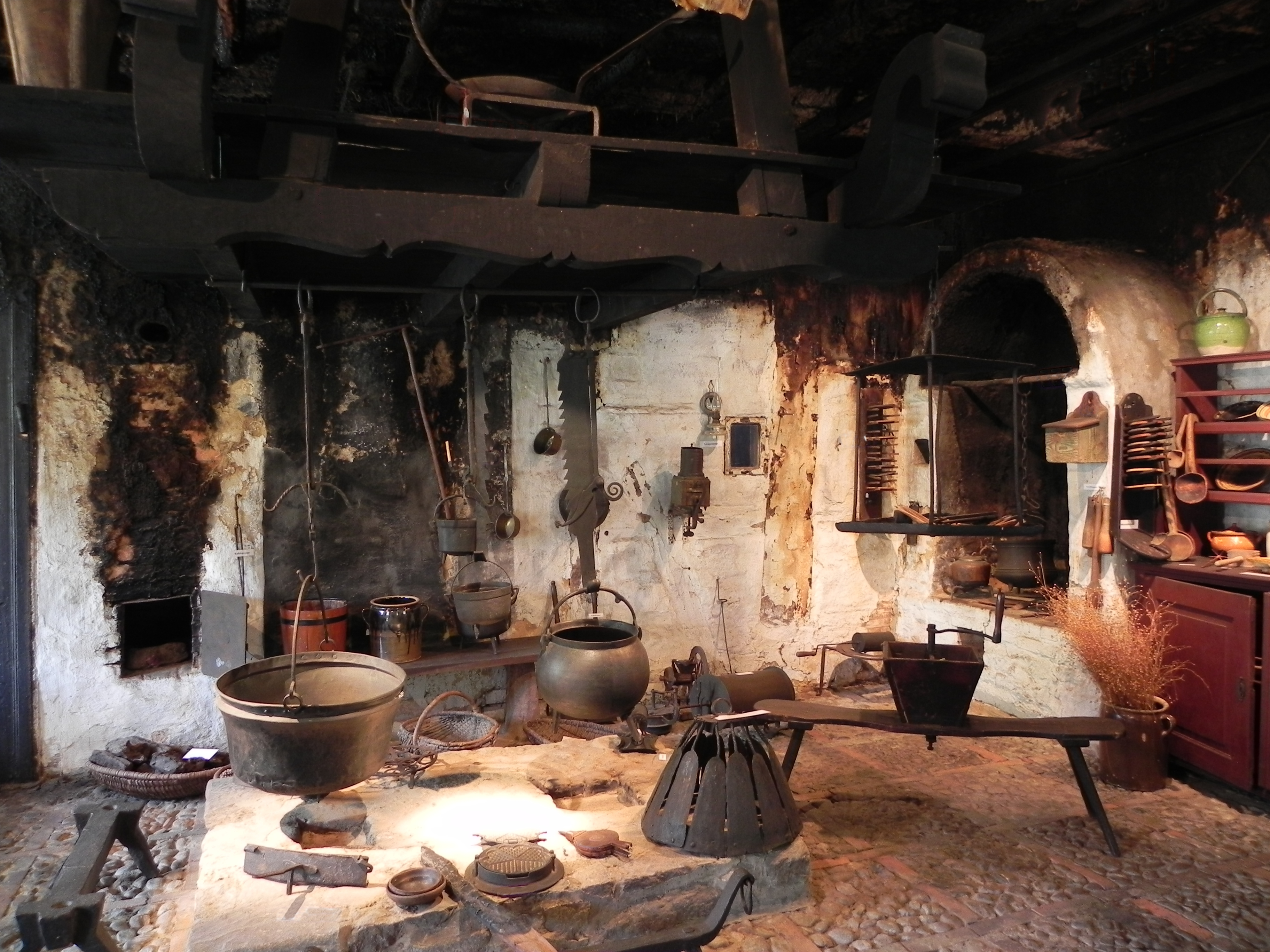 Feuerstelle im Museum "Römstedthaus" (ehemaliges Rauchhaus), in Bergen (Celle), Niedersachsen, Germany